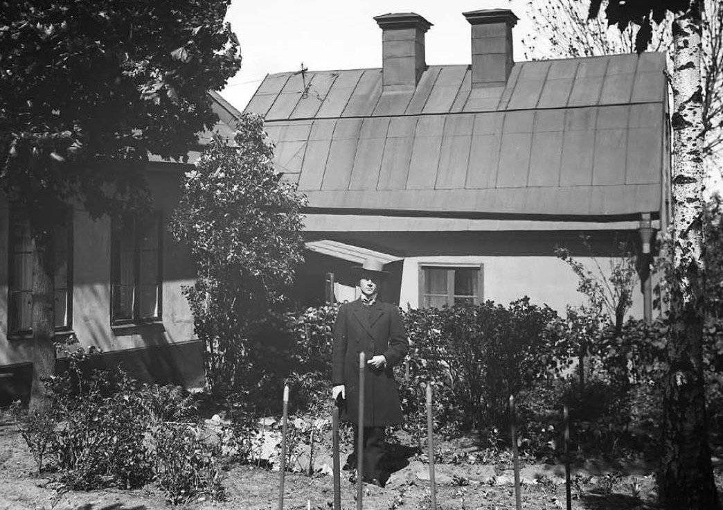 Tonsättare Ture Rangström i sin trädgård 1918, foto ur Modins samling